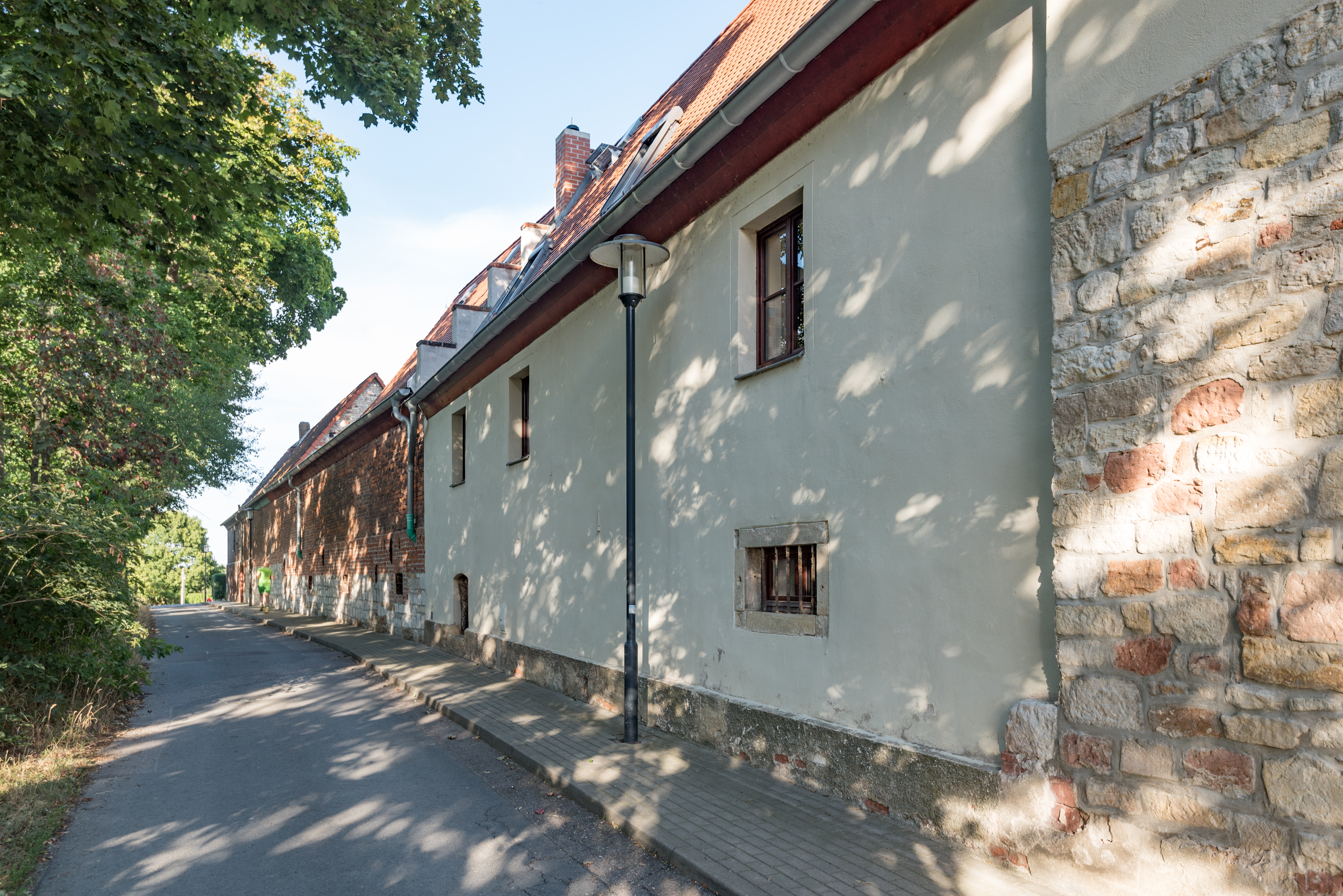 Weißenfels, An der Beude 4